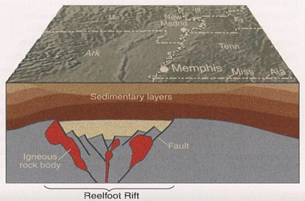 Beschreibung, Quelle und Lizenz Bildbeschreibung: Reelfoot Rift Quelle: Datum: 09.10.2005